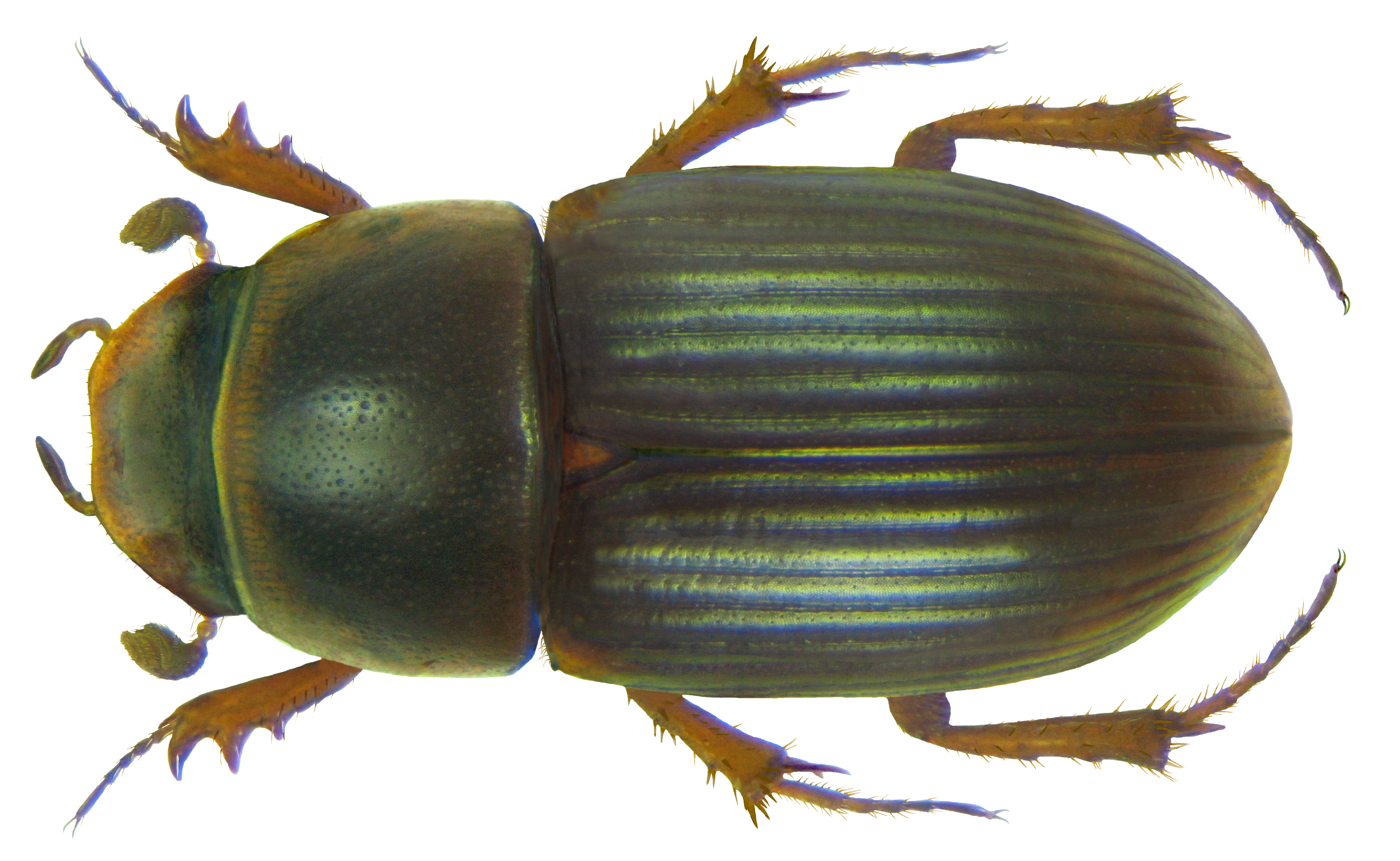 Familie: Scarabaeidae Groesse: 3,6 mm Fundort: Indien, Südgoa, District Canacona, Canacona, Raj Baga Beach leg. U.Schmidt, 20.XI.2010; det. Bellmann, 2011 Photo: U.Schmidt, 2012